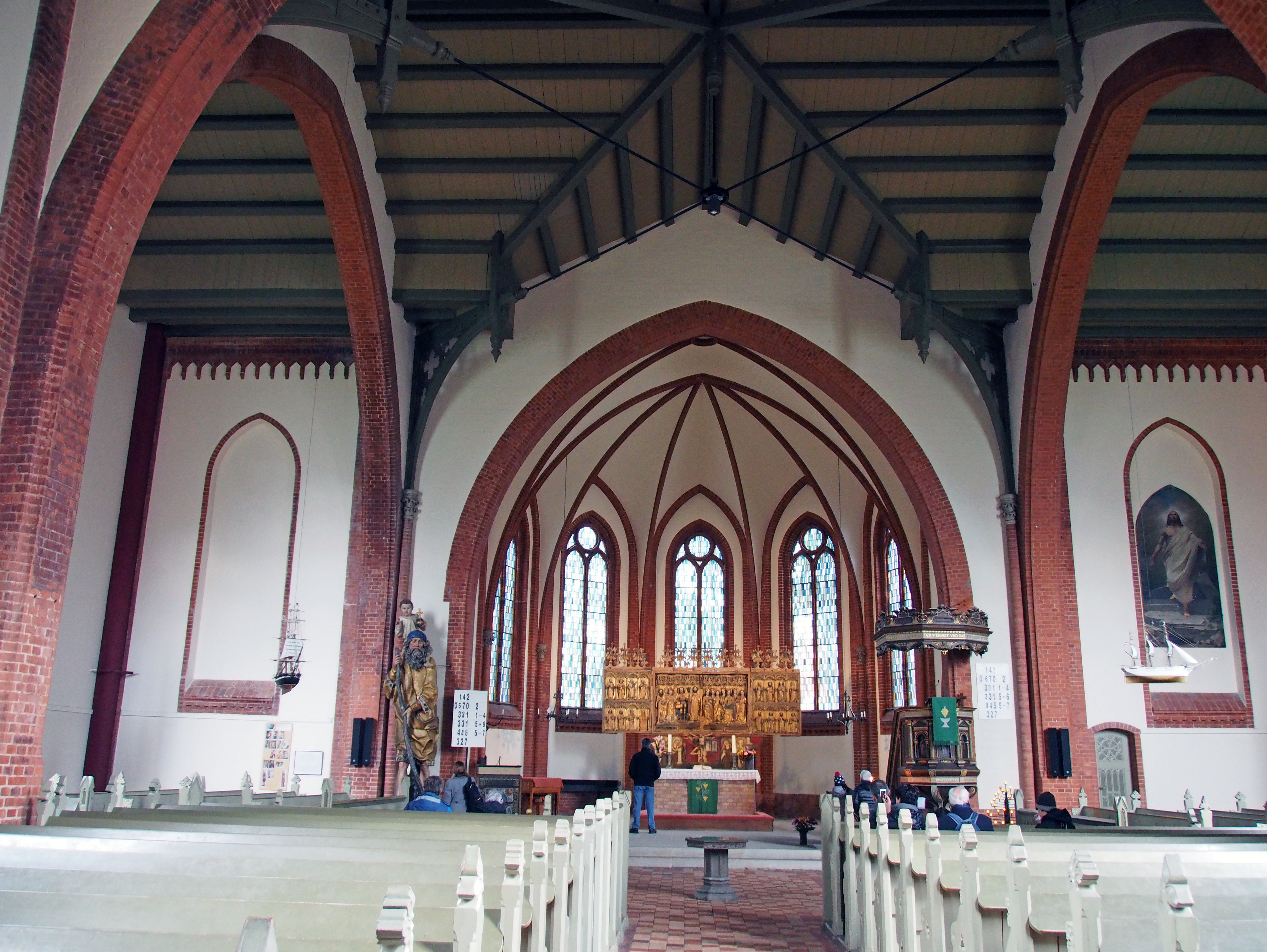 Langhaus der Warnemünder Kirche